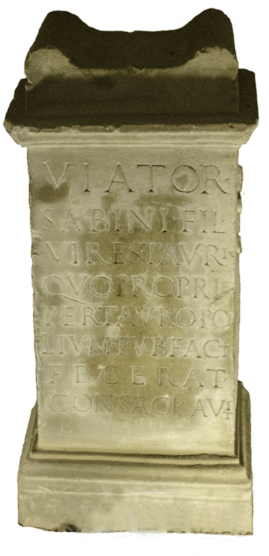 Autel taurobolique de Viator. Musée Eugène-Camoreyt de Lectoure, Gers, France.